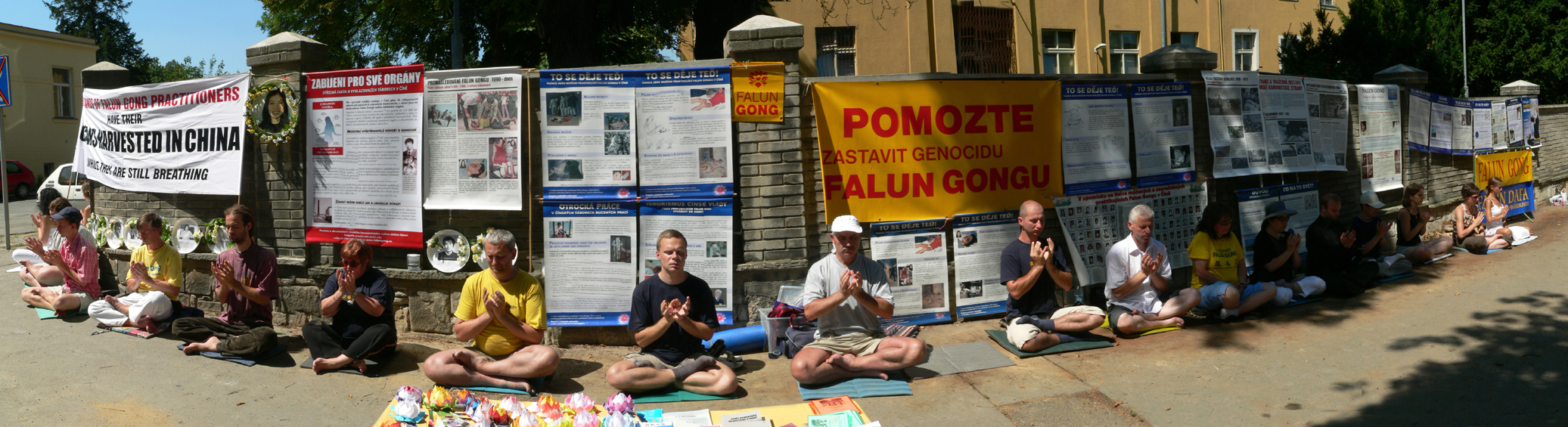 Česky: Protest před čínskou ambasádou v Praze v Peléově ulici proti pronásledování lidí kteří se věnují meditační praxi Falun Gong čínským režimem. Více na